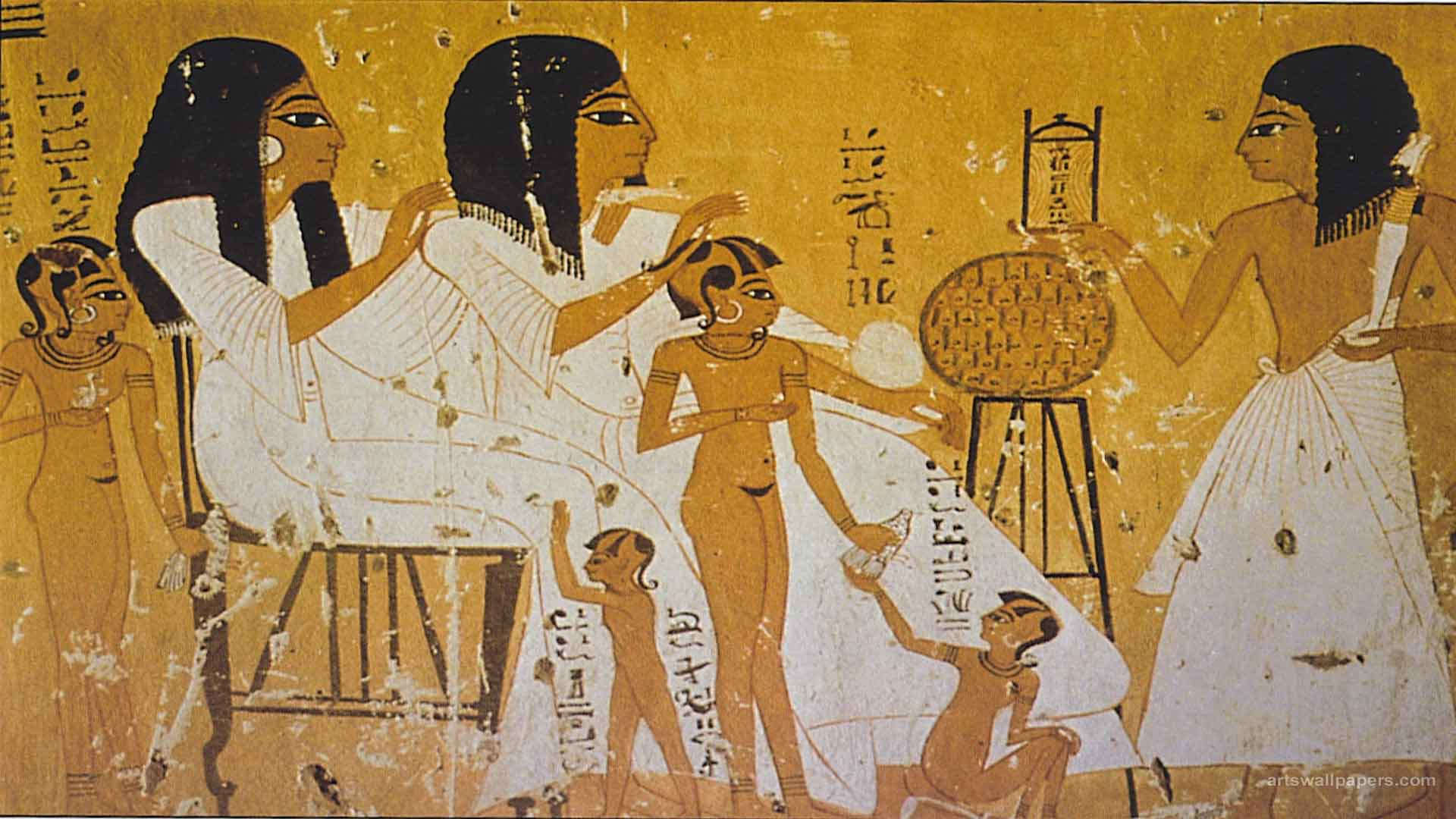 Attēlots Senās Ēģiptes perspektīvas izmantojums, varam redzēt, ka viss tiek zīmēts no dažādiem leņķiem.